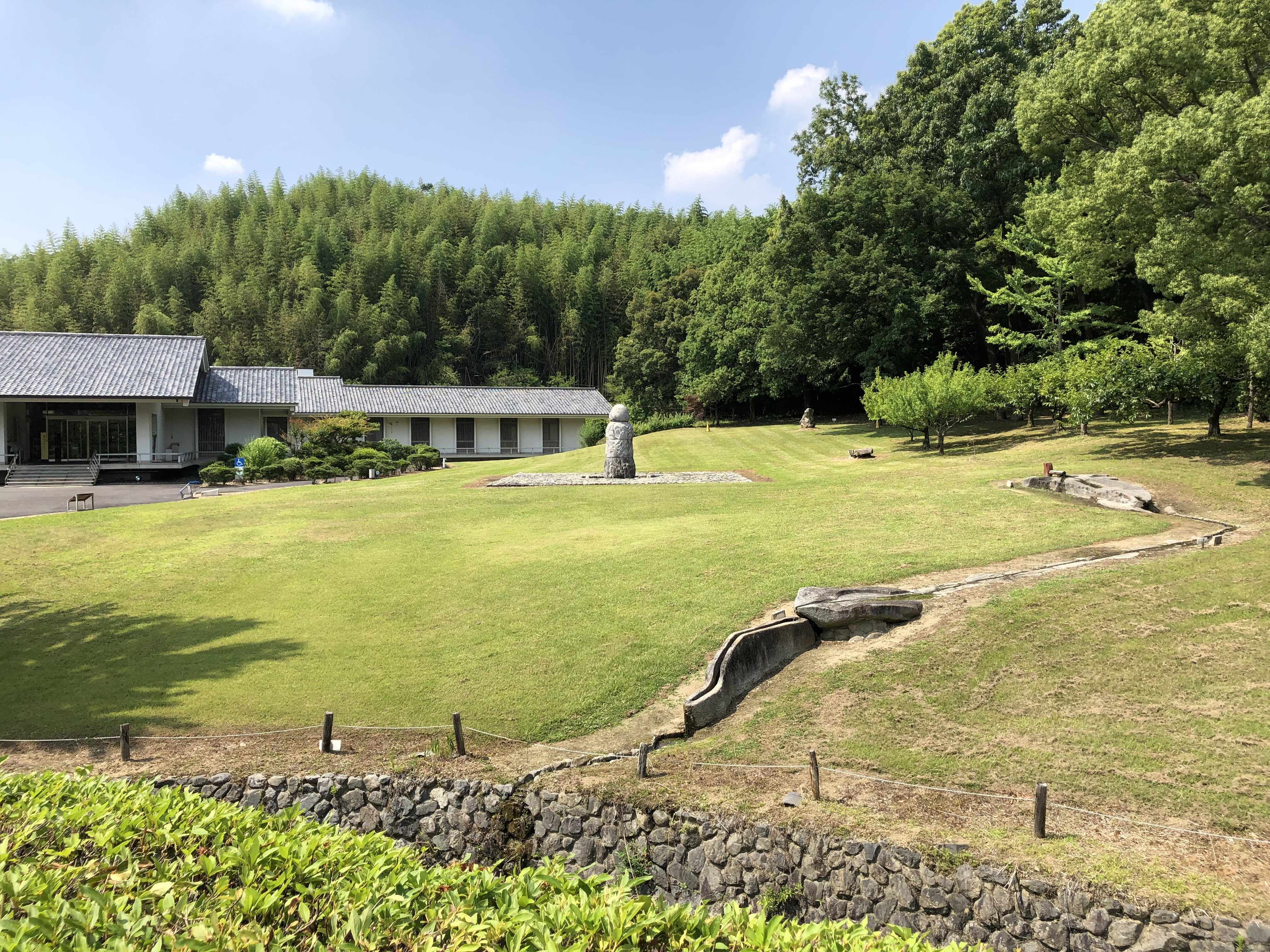 飛鳥資料館庭園 (2019年6月)